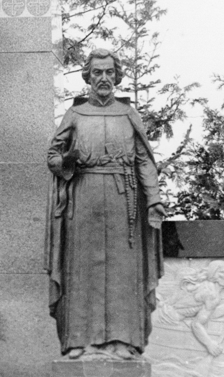 Monument de la découverte du Lac Saint-Jean par Jean de Quen, Desbiens, Québec